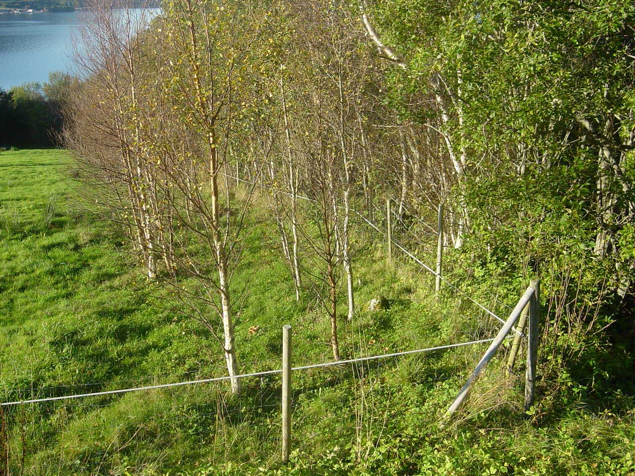 Gjengroing av kulturlandskap.